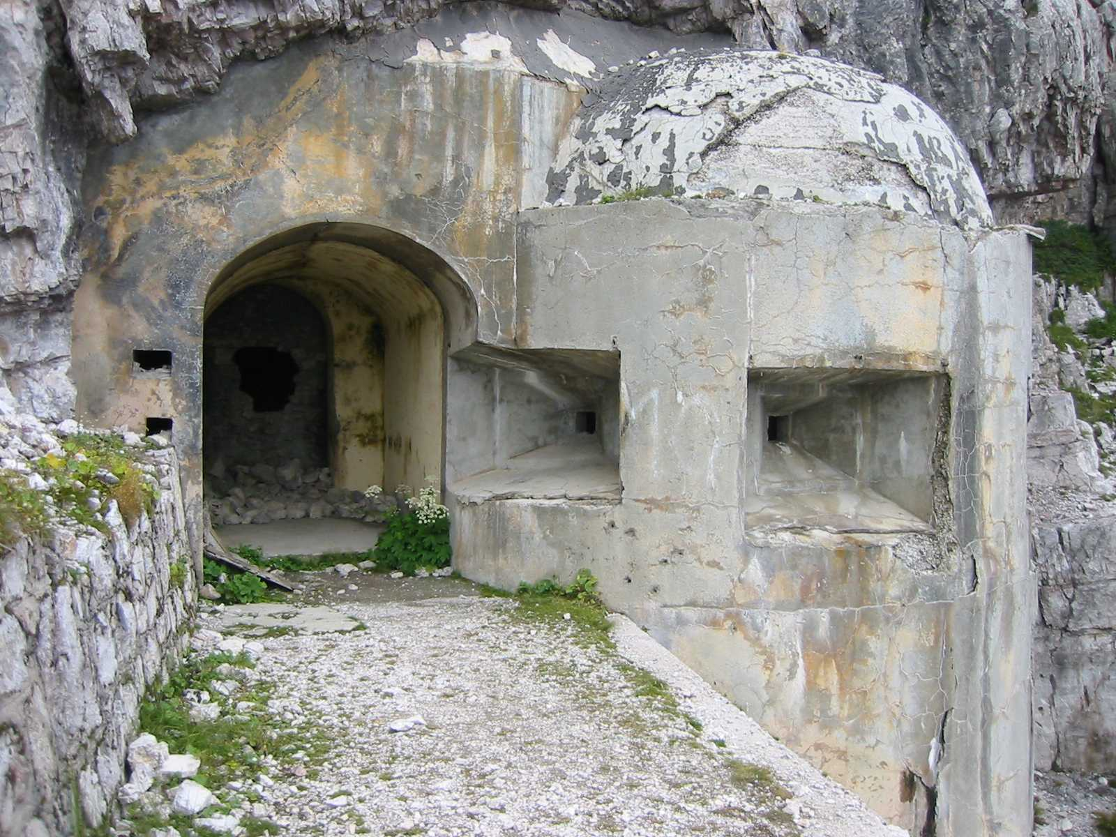 Foto scattata in settembre 2004 da Fantasy :-)